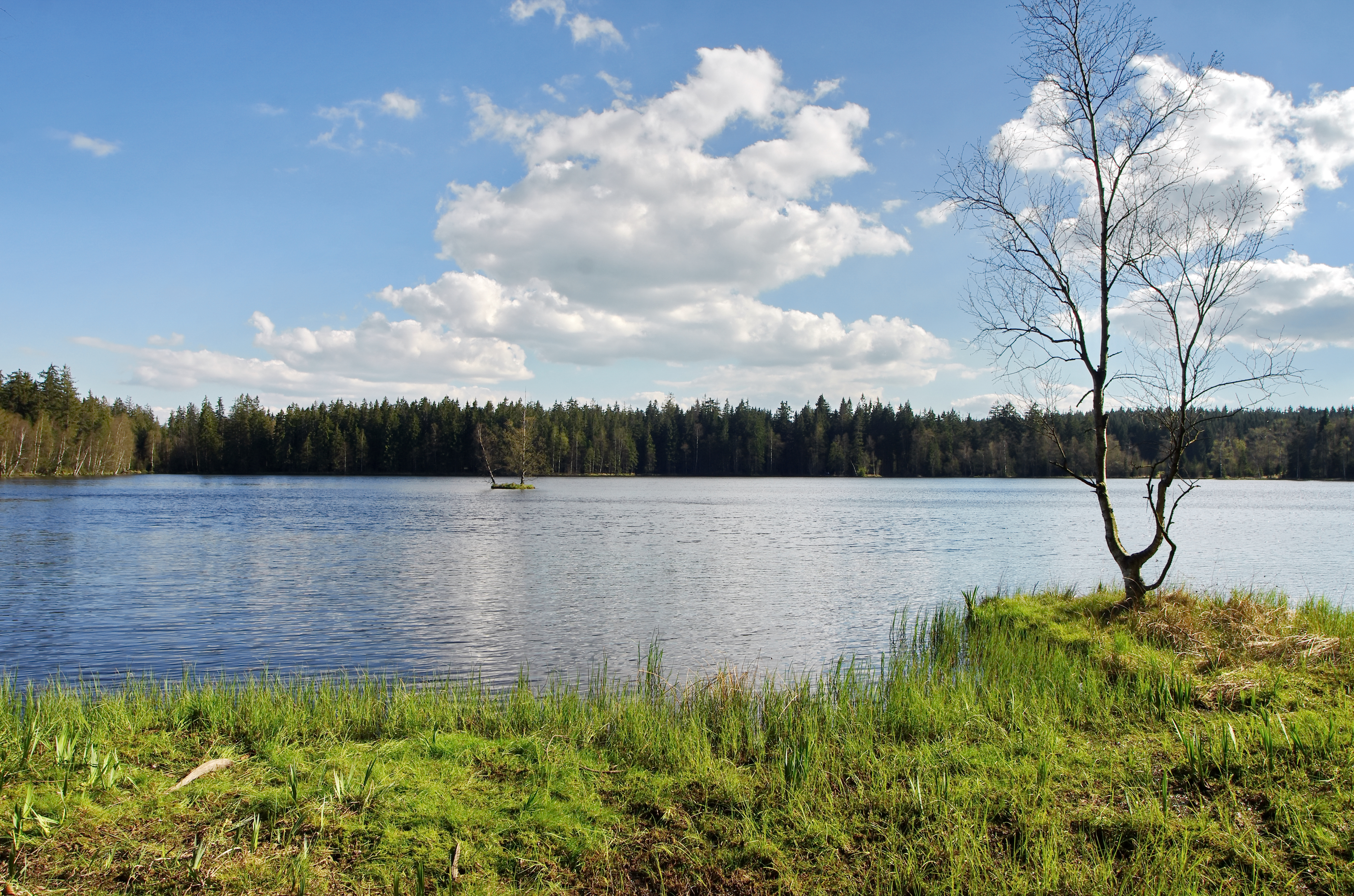 Národní přírodní rezervace Kladské rašeliny, Kladský rybník, okres Cheb